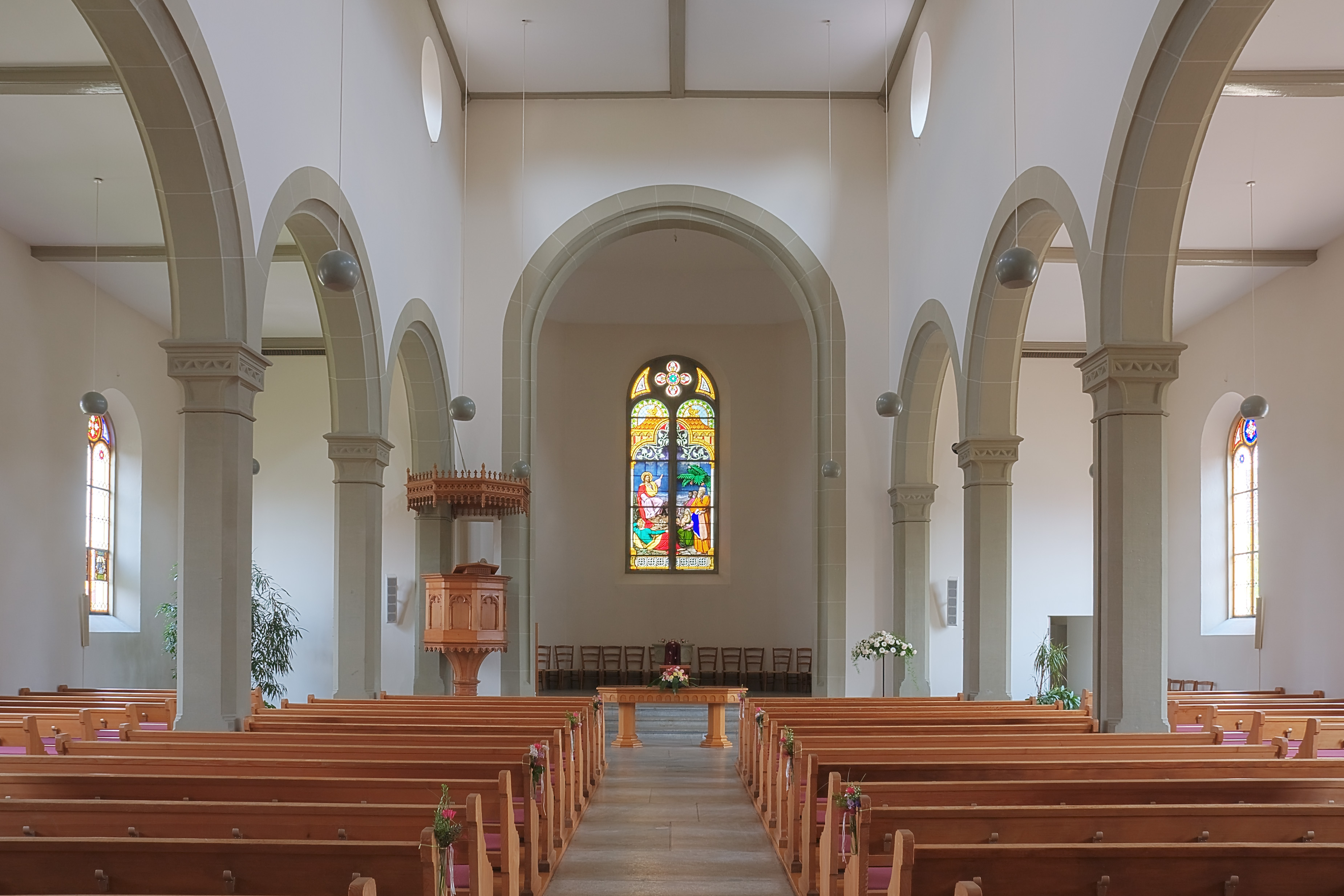 Innenansicht der Kirche in Oberentfelden zentralArchitekt Ferdinand Stadler